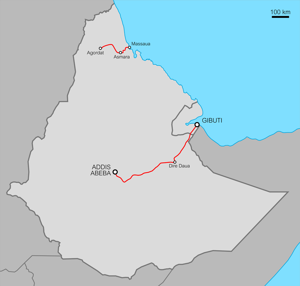 Le ferrovie in Etiopia dal 1952 al 1978